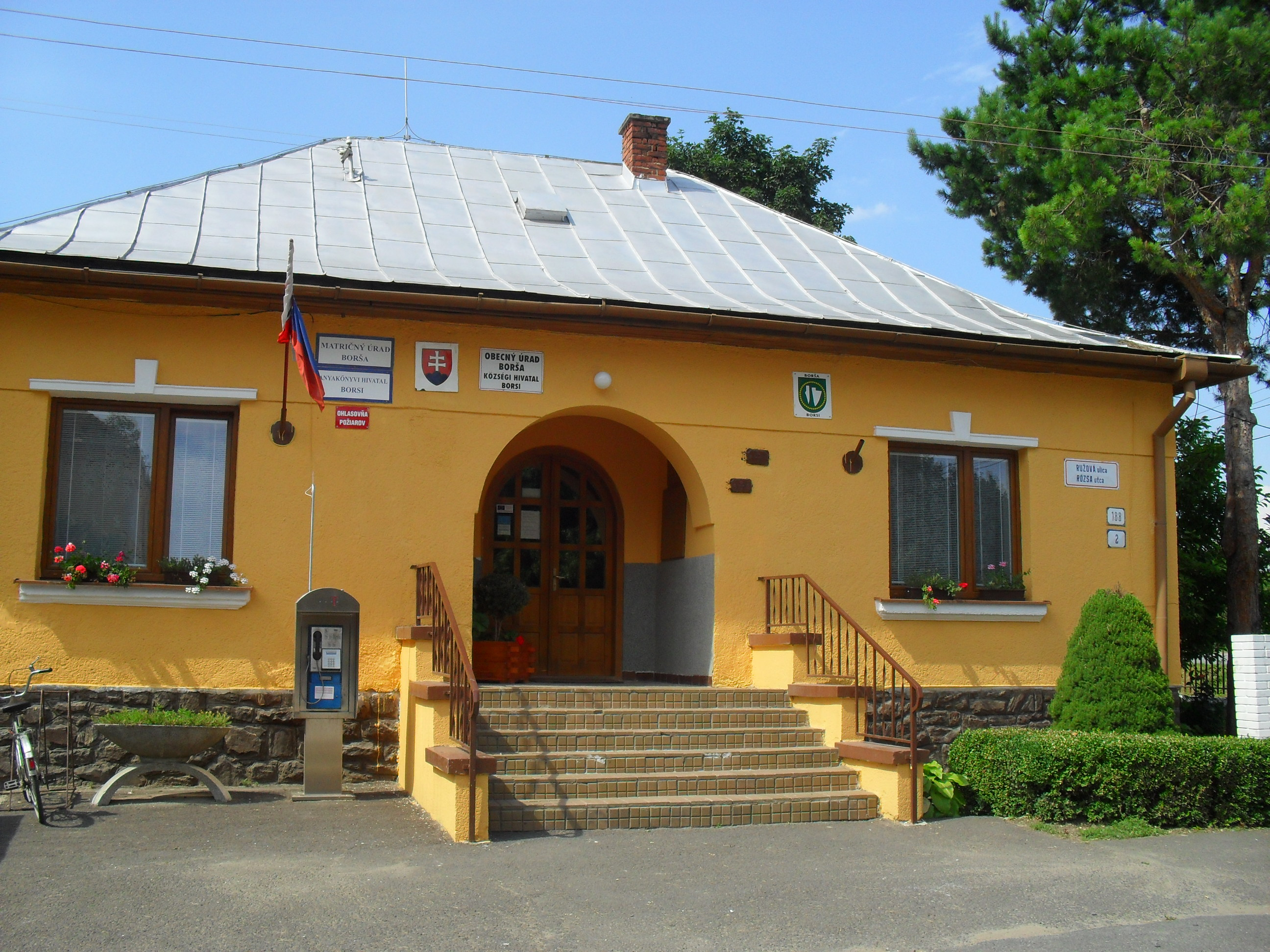 Borsi - községi hivatal